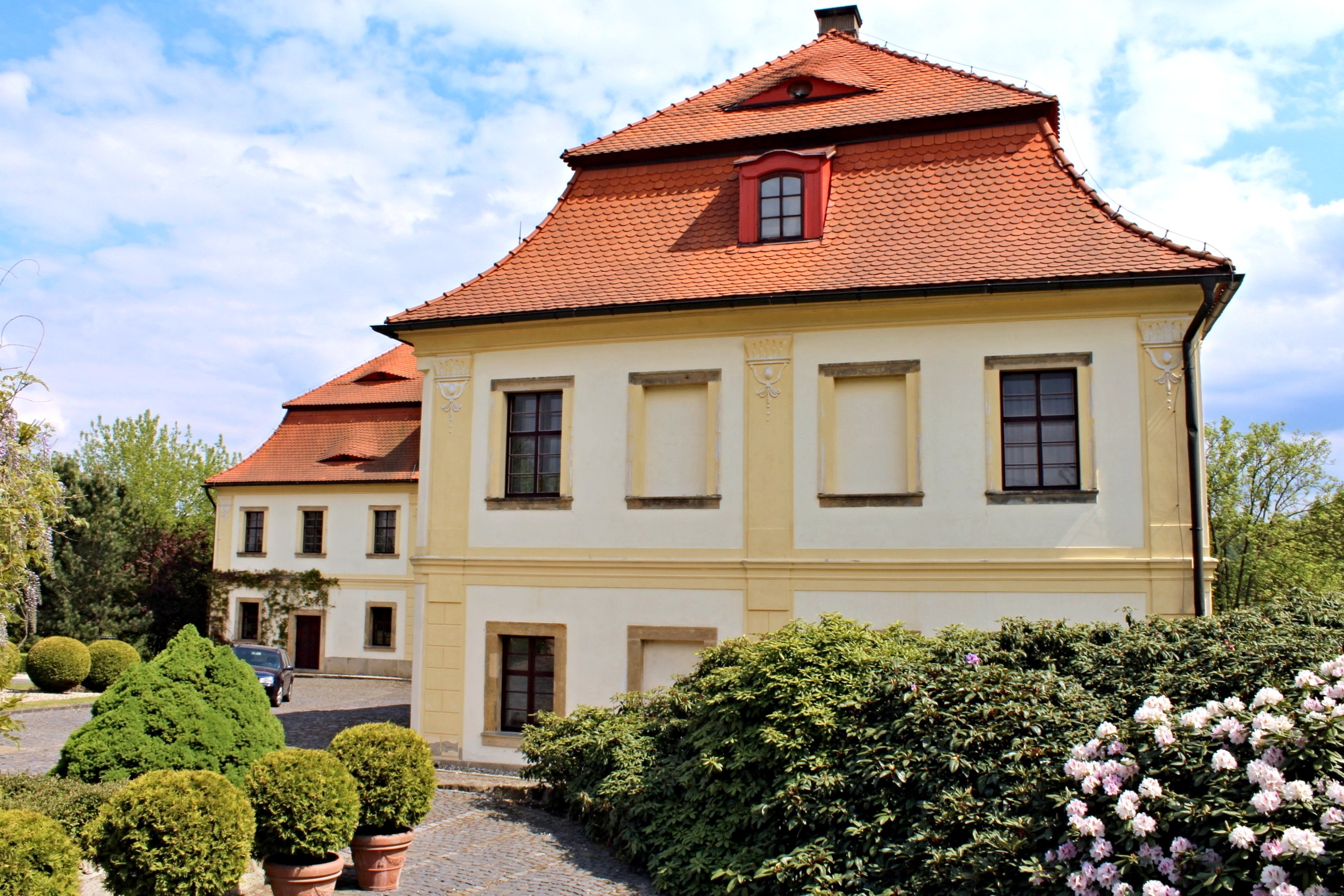 Palmeho dvůr v Jablonném-Markvarticích